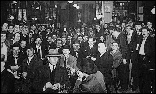 Buenos Aires (Argentine). Café Los Inmortales, vers 1920.